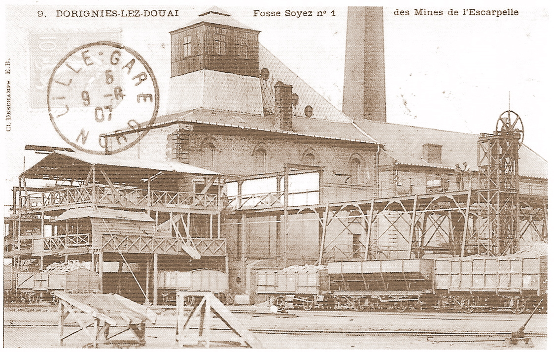 La Fosse n° 1 de la Compagnie des mines de l'Escarpelle était un charbonnage constitué d'un seul puits situé à Roost-Warendin, Nord, Nord-Pas-de-Calais, France.